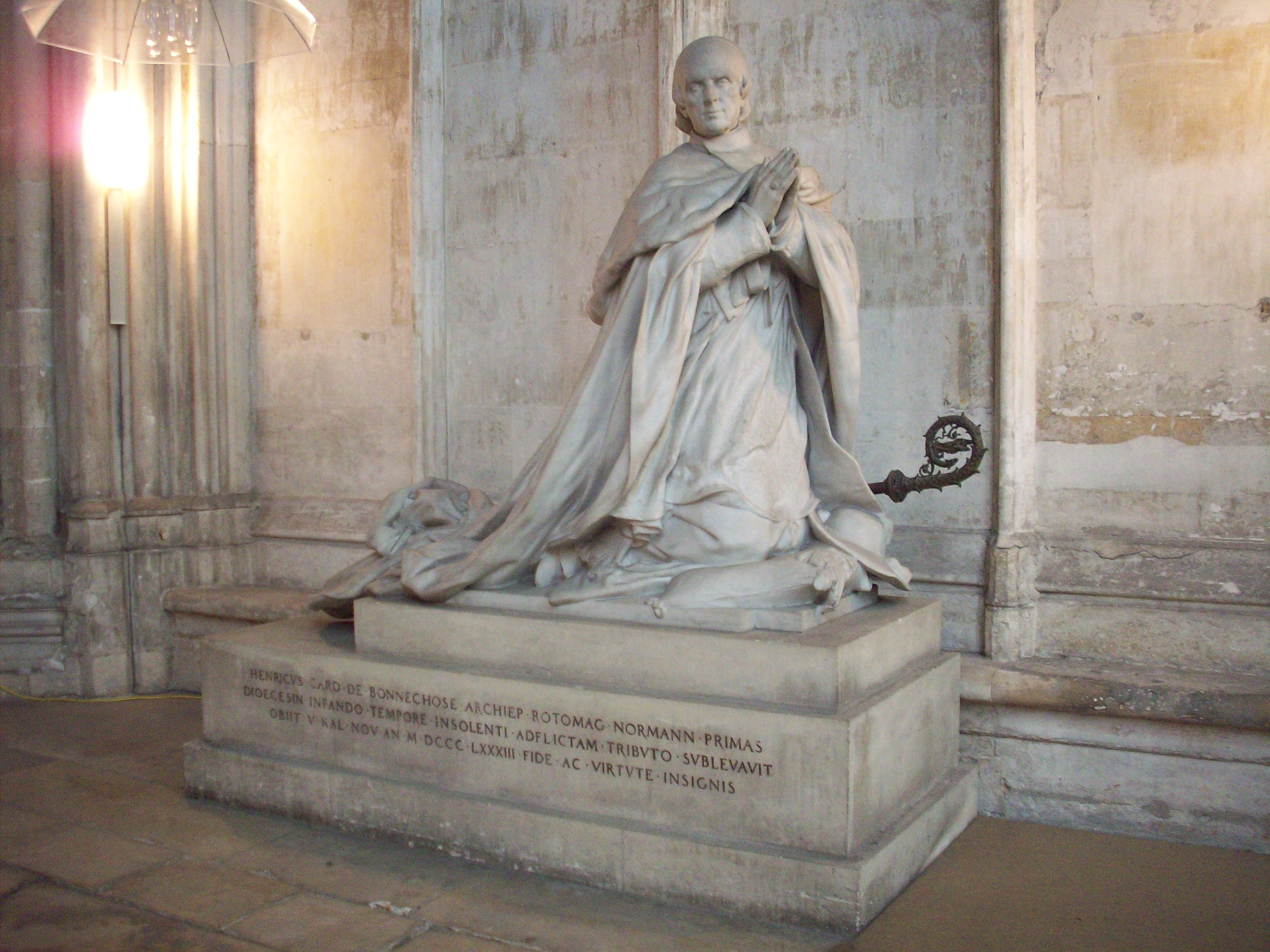 Orant d'Henri de Bonnechose, dans la chapelle de la Vierge (1891) de la cathédrale de Rouen.